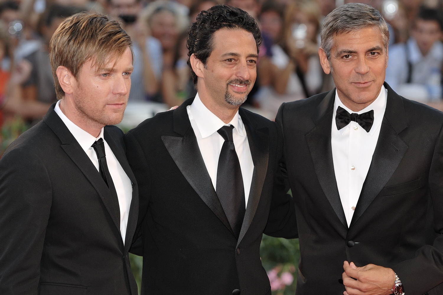 66ème Festival du Cinéma de Venise (Mostra), 6ème jour (07/09/2009) Tapis Rouge avec George Clooney et Elisabetta Canalis, Ewan McGregor et le réalisateur Grant Heslov pour le film : The men who stare at goats